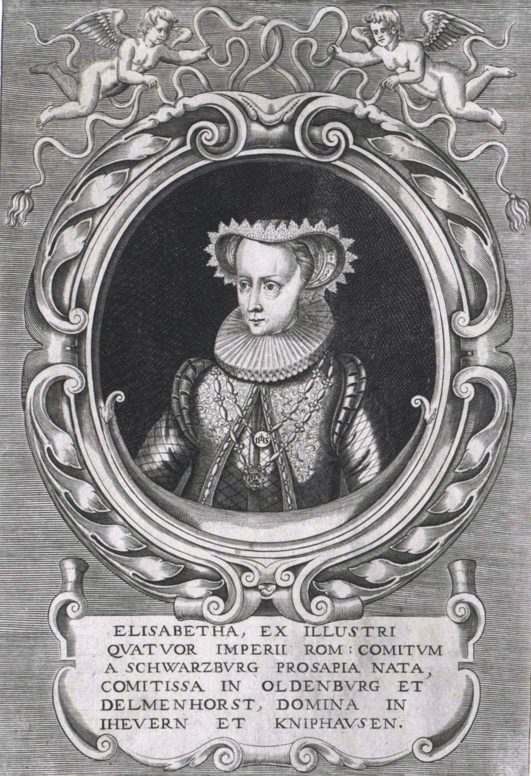 Elisabeth von Schwarzburg-Blankenburg (1541–1612)